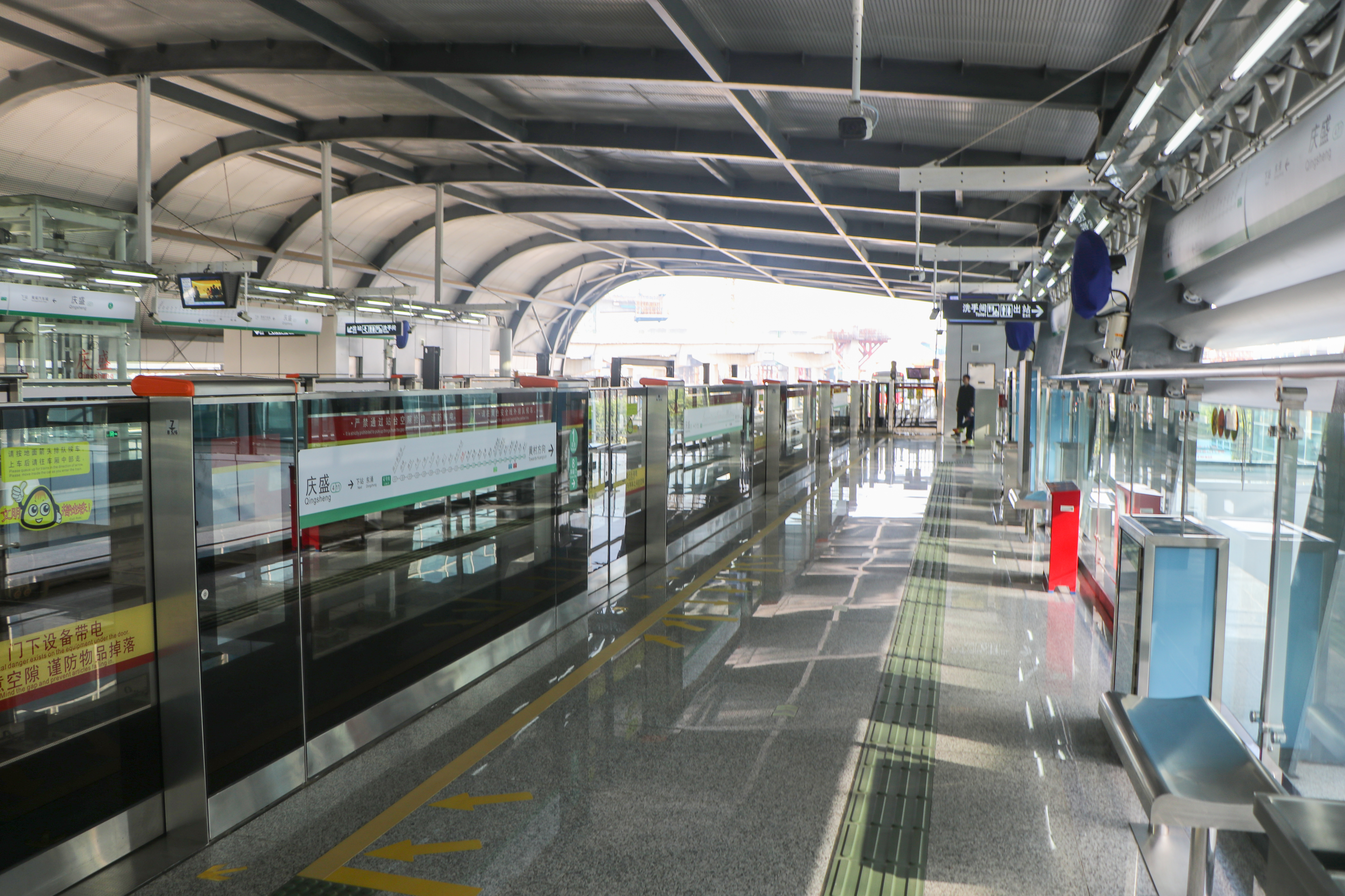 广州地铁庆盛站